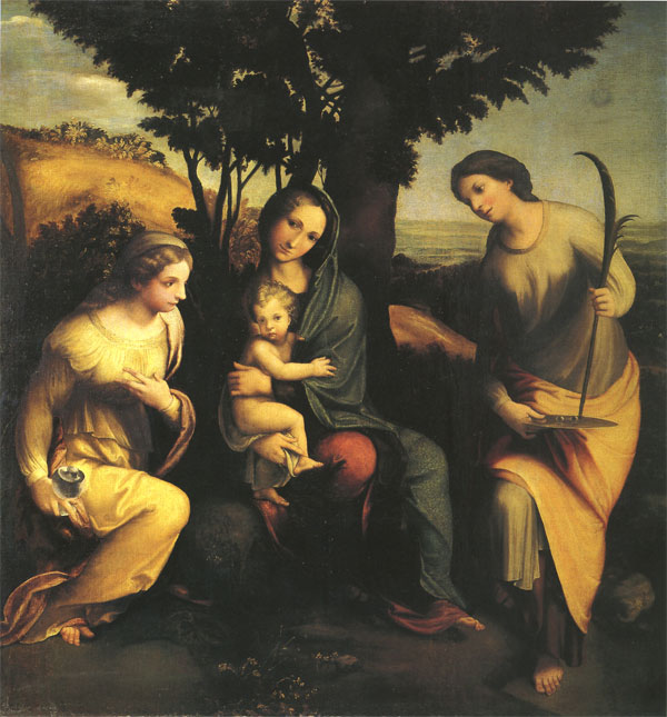 Copia della madonna di albinea di correggio